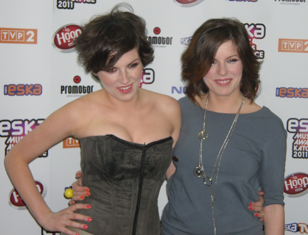 Zdjęcie zrobione podczas Eska Music Awards 2011 w katowickim Spodku.